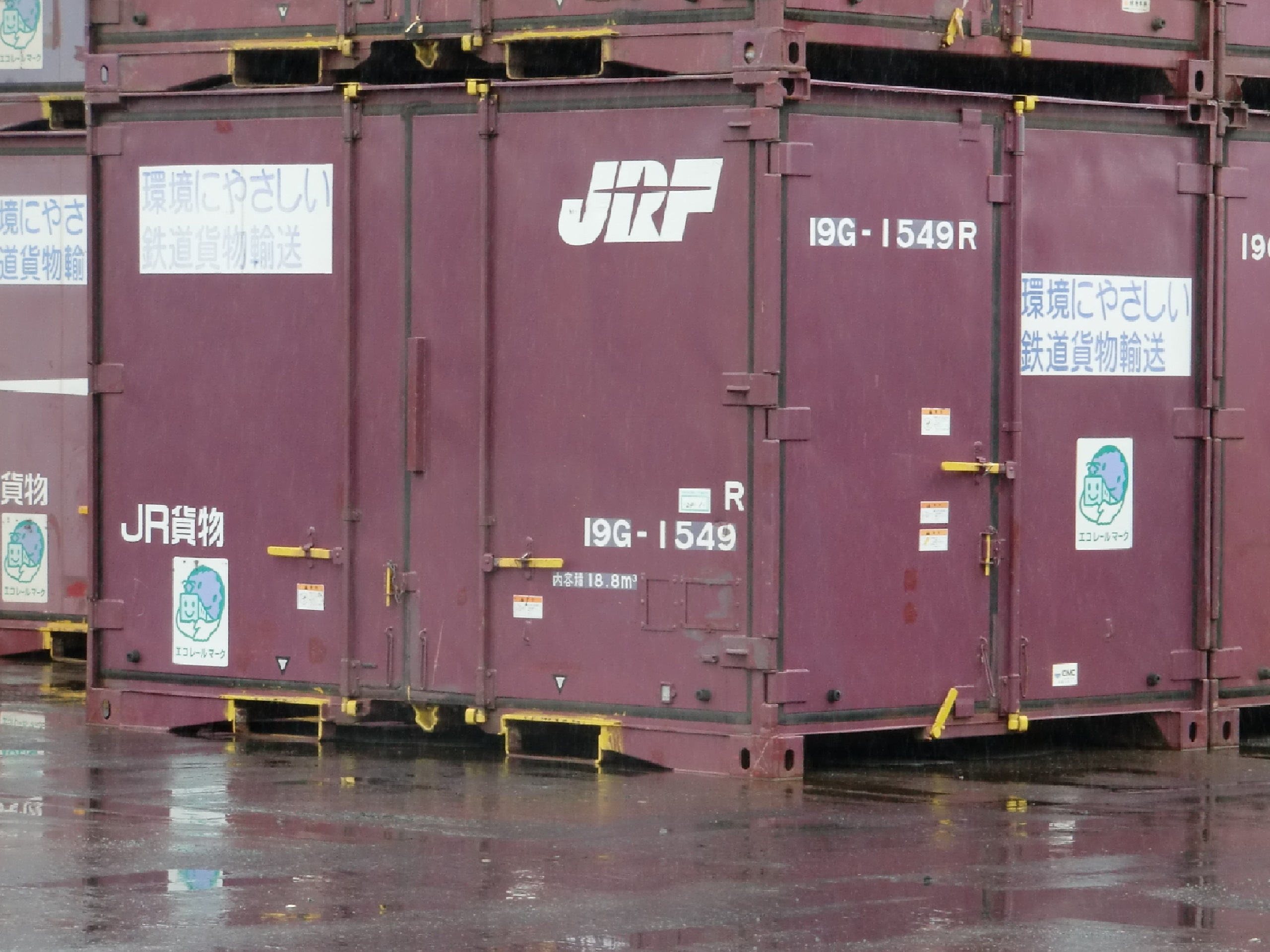 撮影地＝【埼玉／羽生ORS】